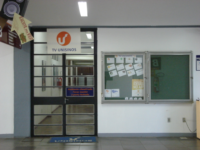 Sede da TV Unisinos em São Leopoldo, RS.